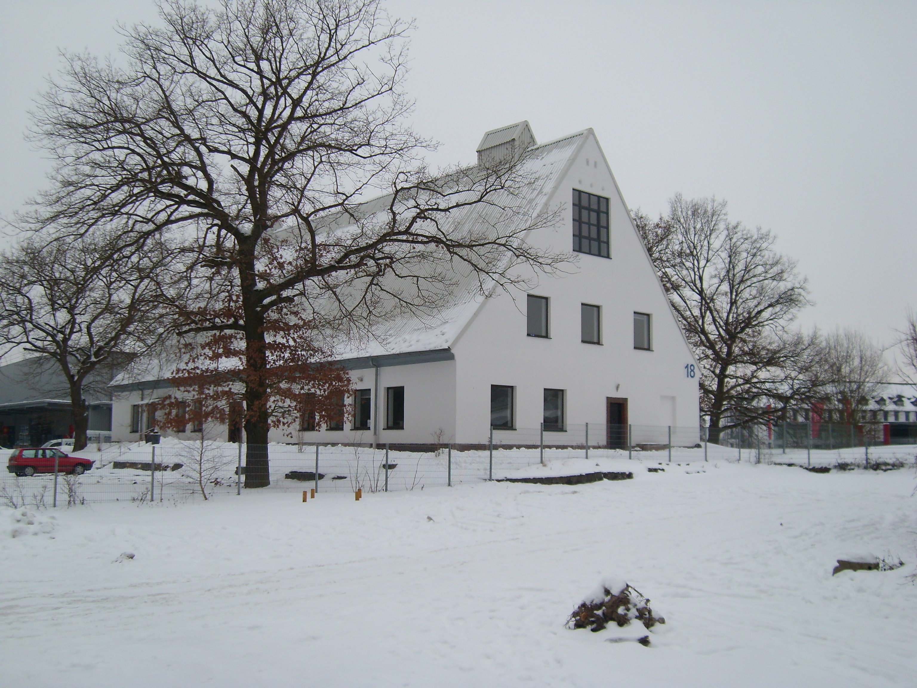 Bild des Ehemaligen Kommandobunkers V18 in Gießen